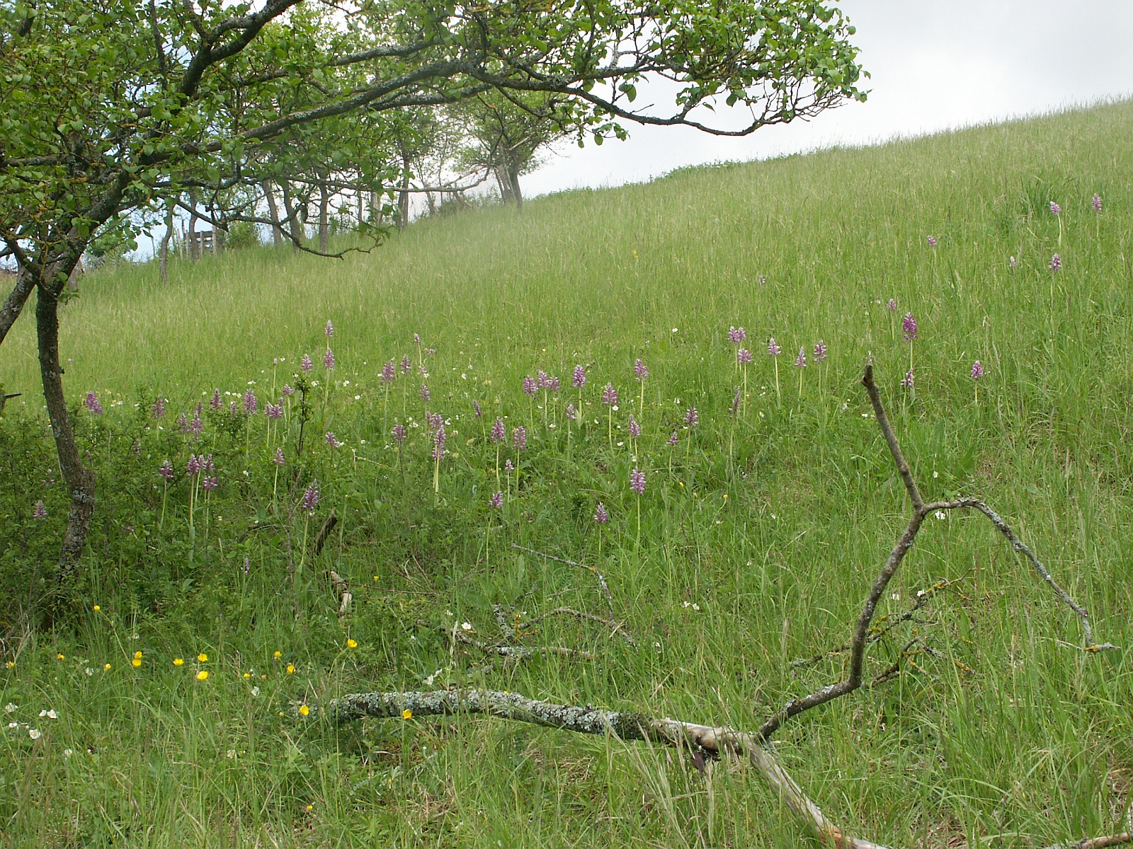 Orchis militaris, northern Baden-Württemberg, Germany